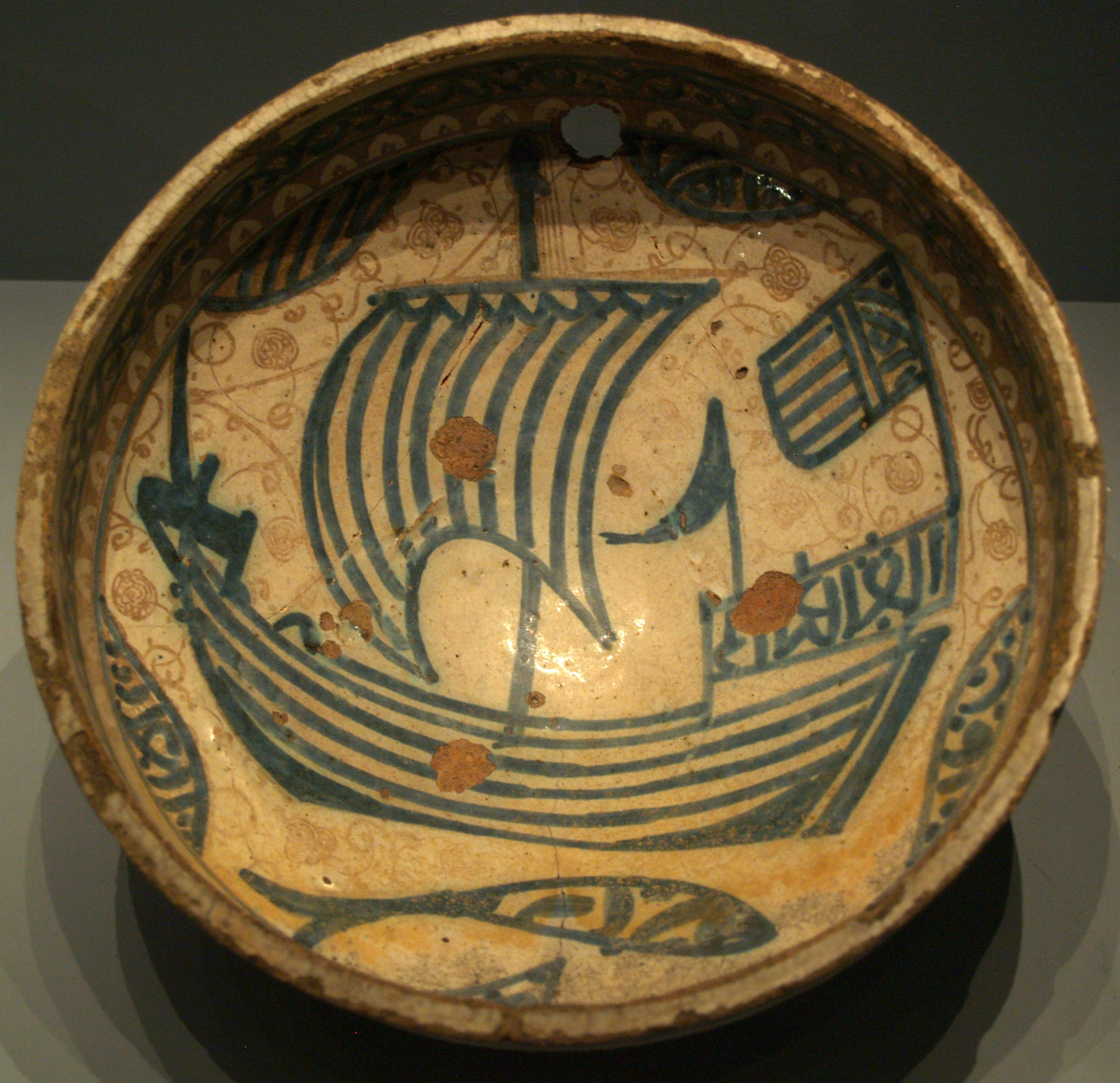 Berlín, Museo de arte islámico, plato de cerámica de Manises, s. XV.